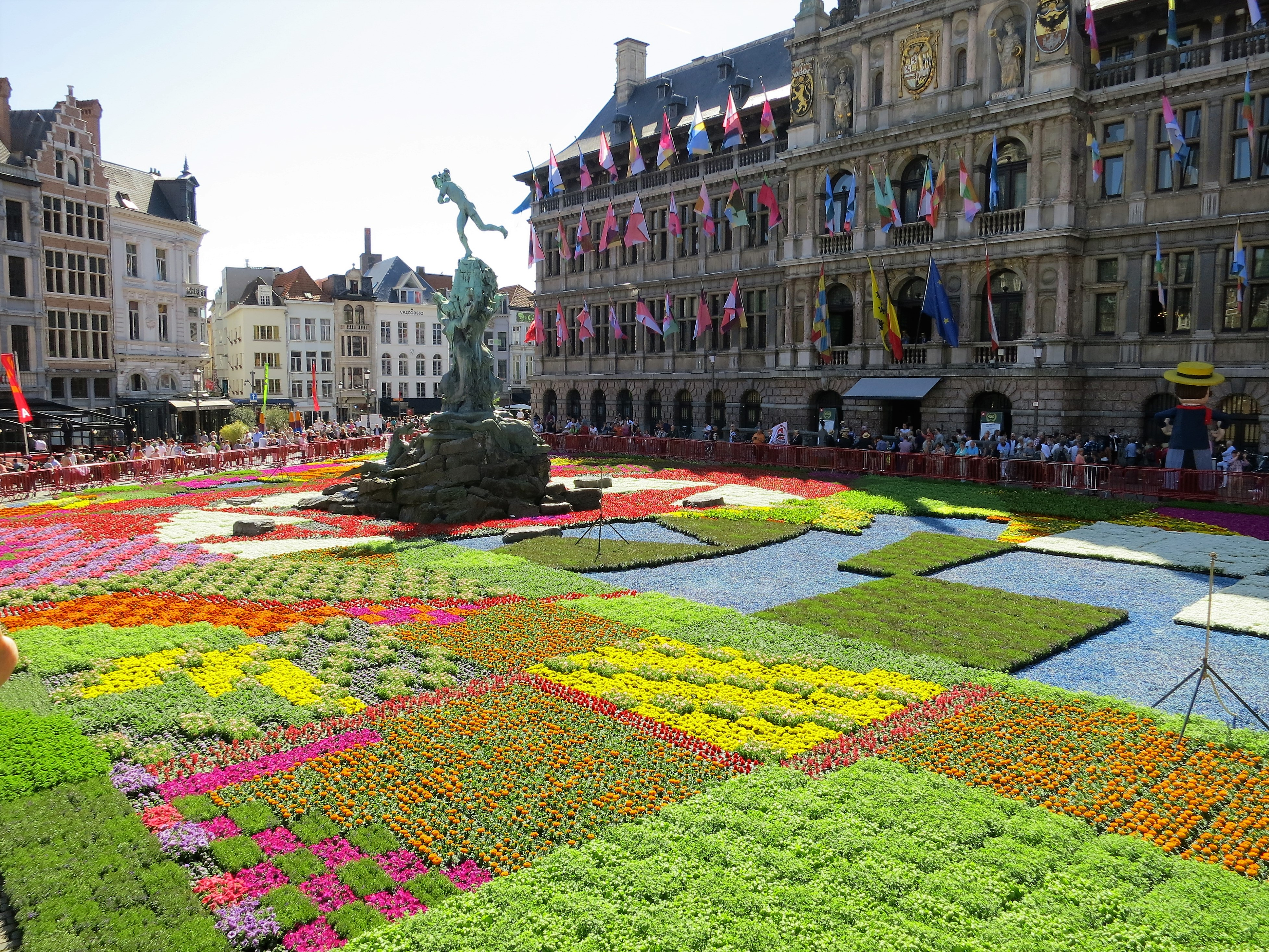 Tapiz floral frente al Ayuntamiento de Amberes. Junio 2015.